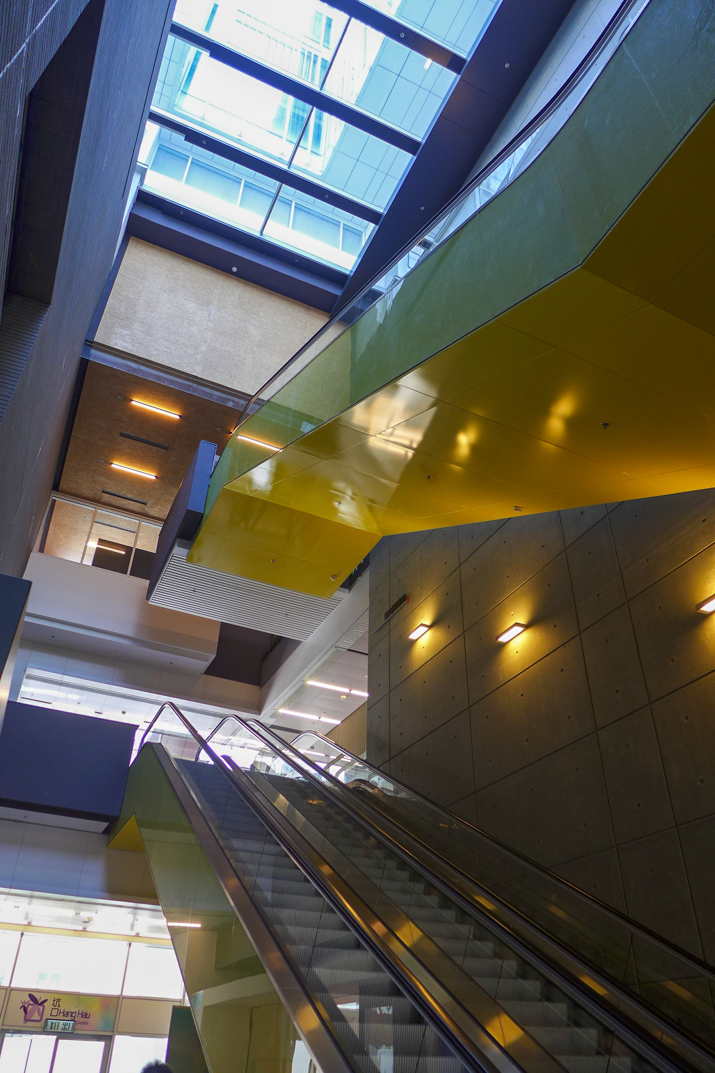 Hang Hau Sports Centre Void